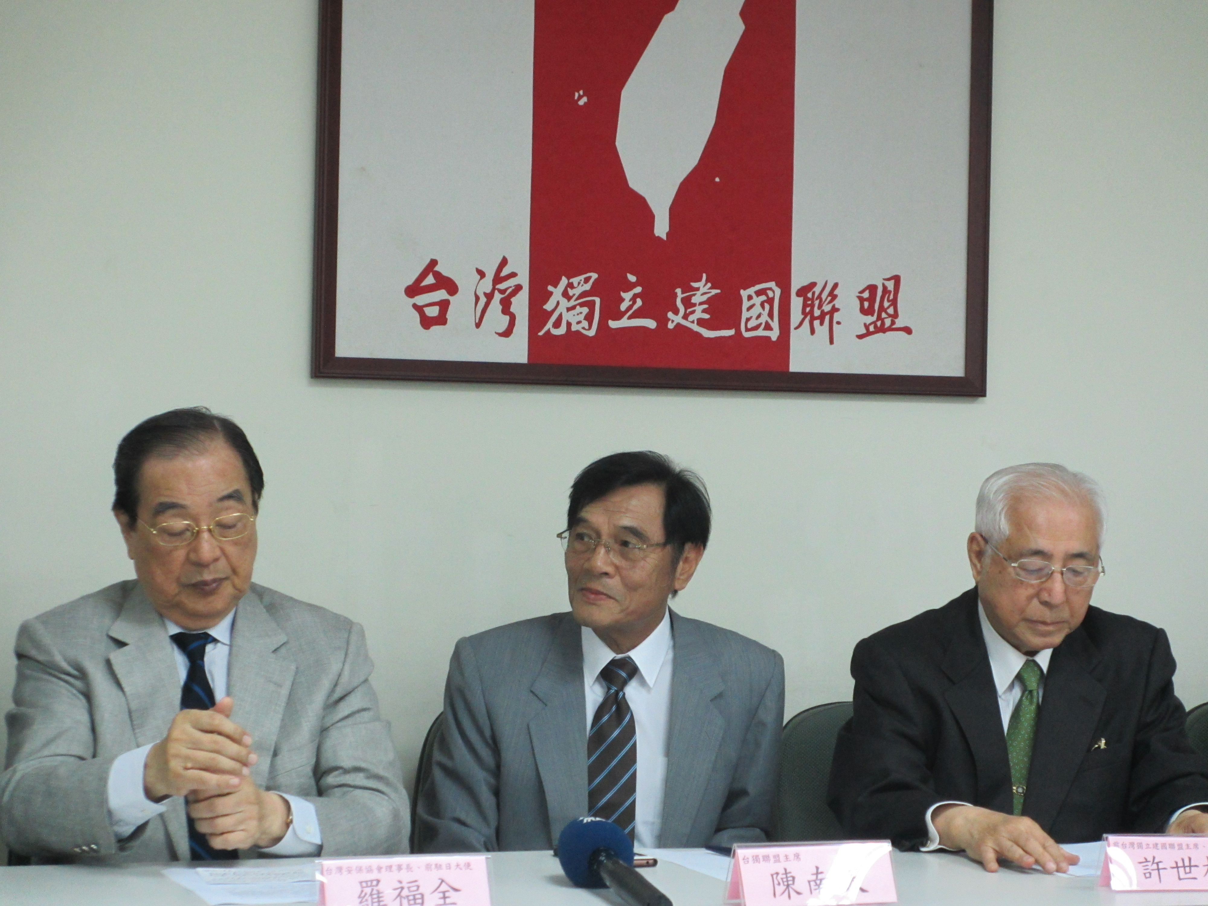 台灣獨立建國聯盟舉辦記者會，台灣安保協會理事長羅福全（左）、台灣獨立建國聯盟主席陳南天（中）、前台灣獨立建國聯盟主席許世楷（右）表態支持民主進步黨主席蔡英文參選中華民國總統，三人後方釘掛台灣獨立建國聯盟旗。